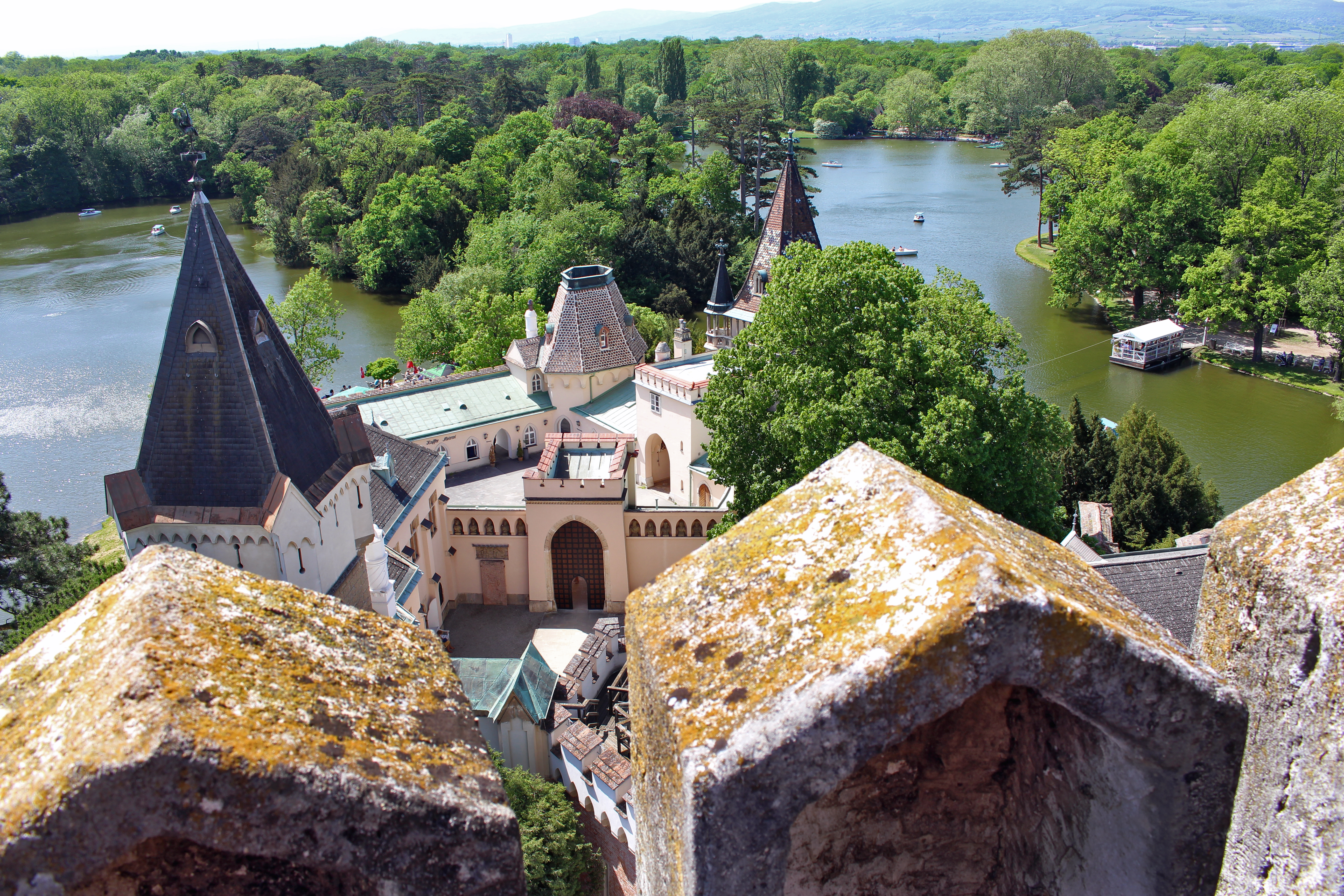 Gesamtanlage Schlosskomplex und Schlosspark Laxenburg